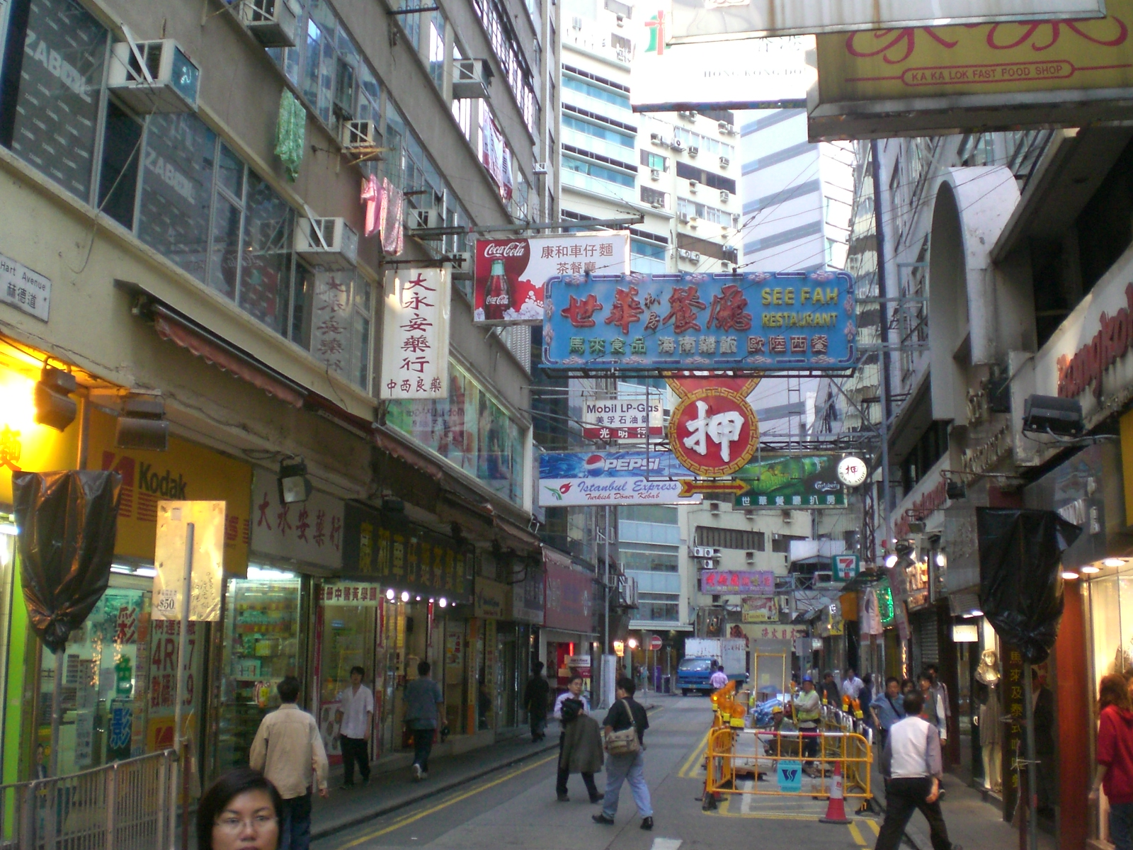 九龍尖沙咀赫德道, Hart Avenue, TST, Hong Kong